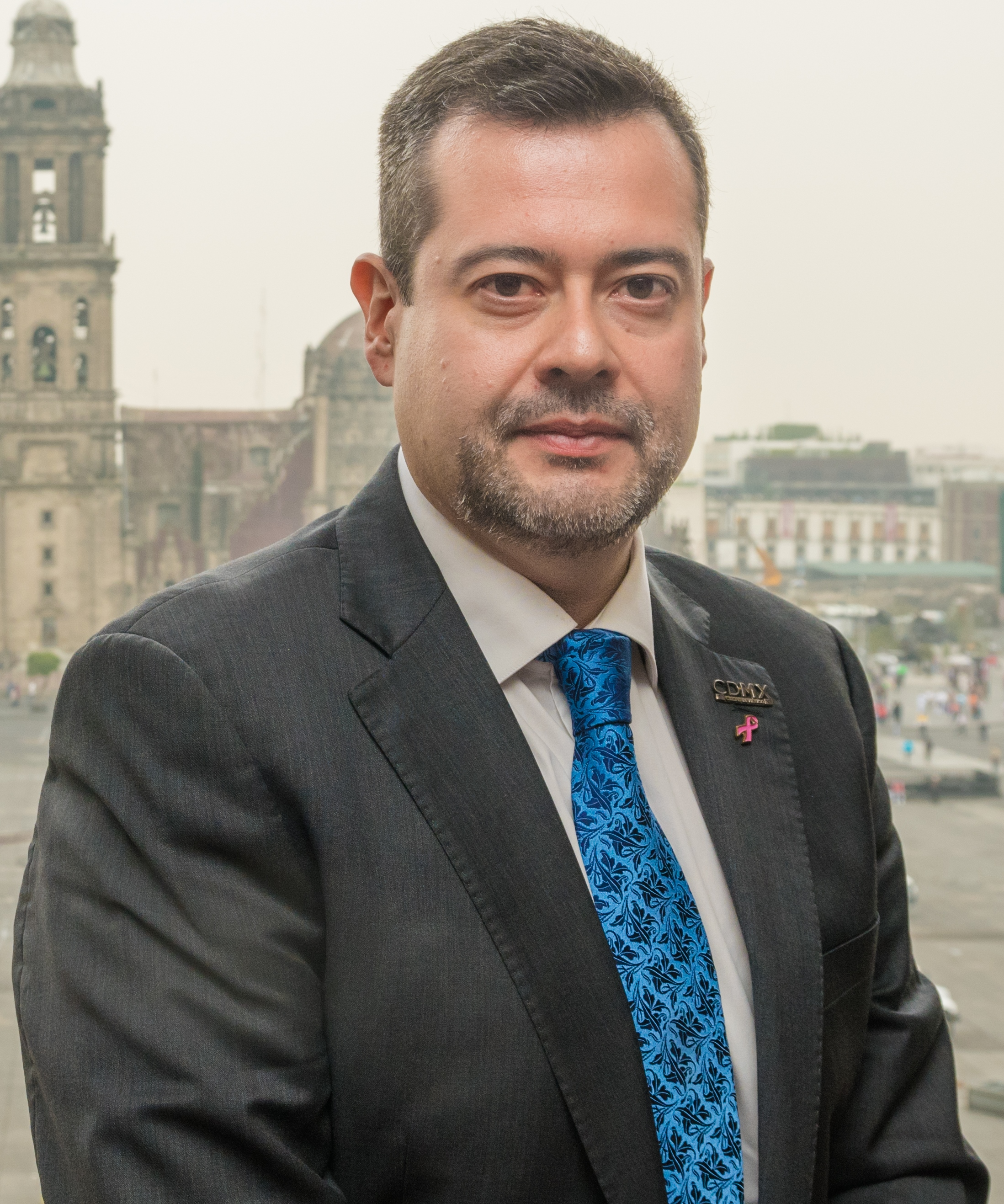 Uno de los defensores a ultranza de Miguel Ángel Mancera. El actual Secretario de Desarrollo Social de la Ciudad de México es amigo y colaborador de Mancera desde hace varios años. Cuando la reportera le preguntó que cómo calificaba al Jefe de Gobierno, Amieva respondió con una imagen futbolística: "Mancera va ganando el partido en el DF. El jefe de Gobierno con este actuó como un director técnico, que hace cambios con muchas finalidades posibles. A veces para reforzar la ofensiva, o la defensiva, o la parte media para contener. A veces, vas ganando y sólo refuerzas la defensa".